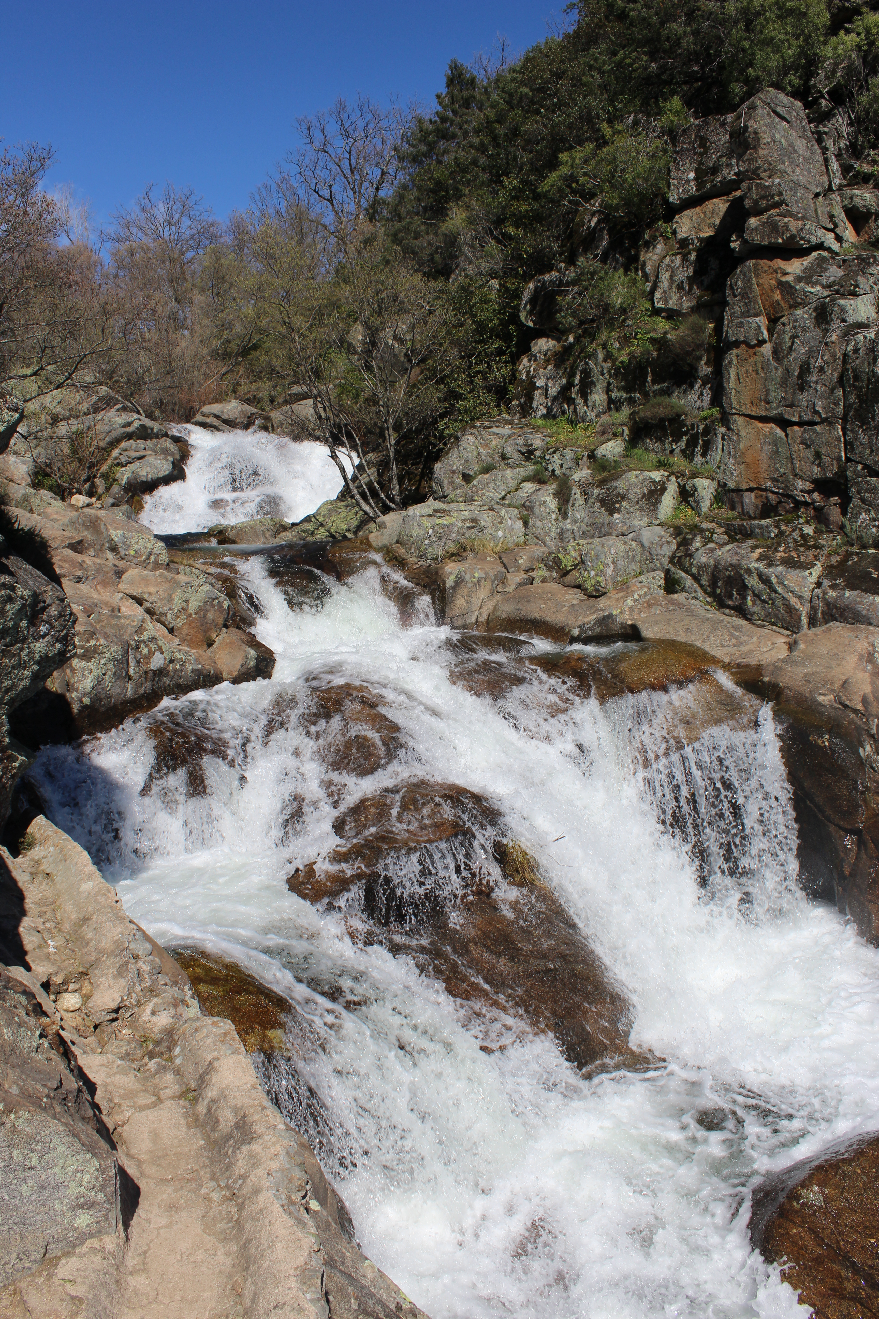 Cascada del Diablo, garganta de Gualtaminos, provincia de Cáceres.